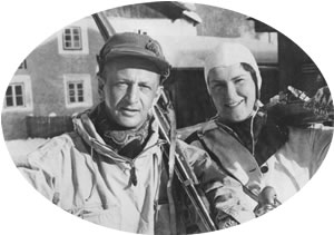 Sven and Dagmar Salén